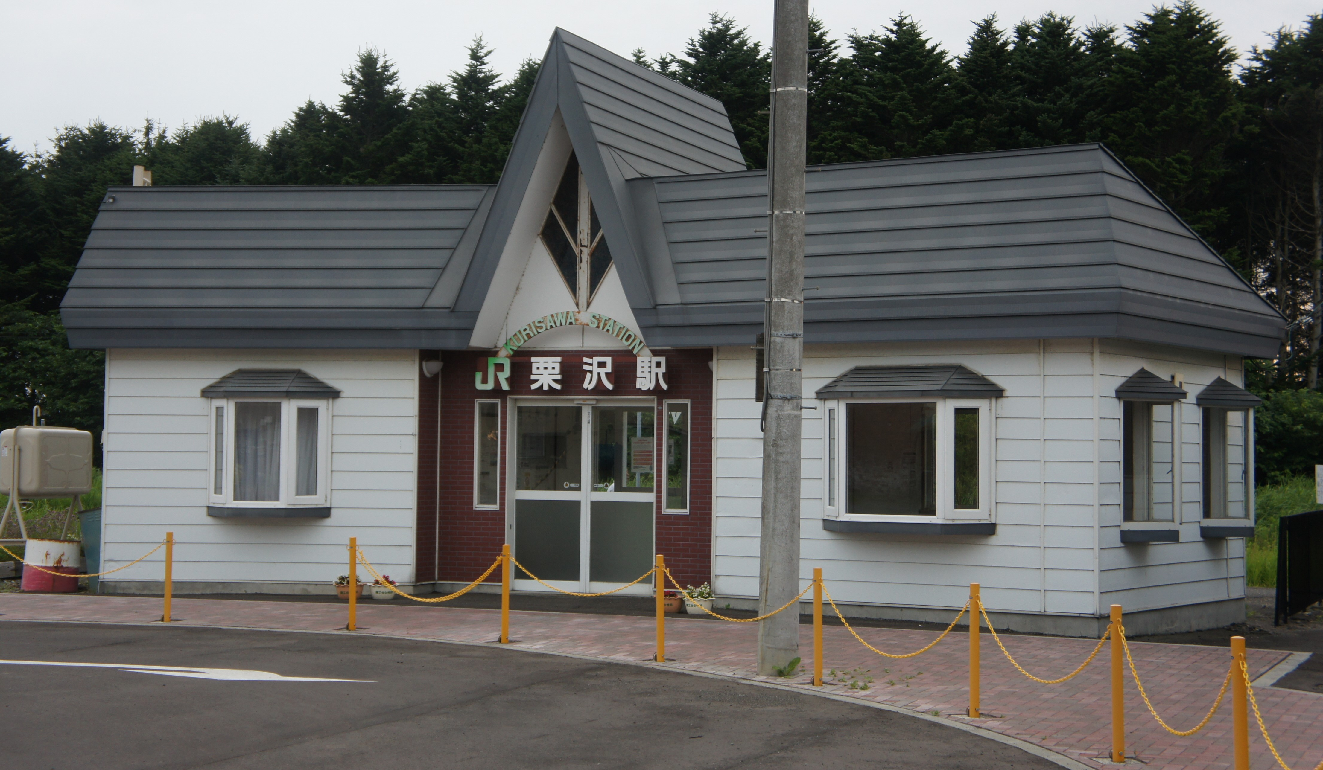 JR室蘭本線・栗沢駅の駅舎